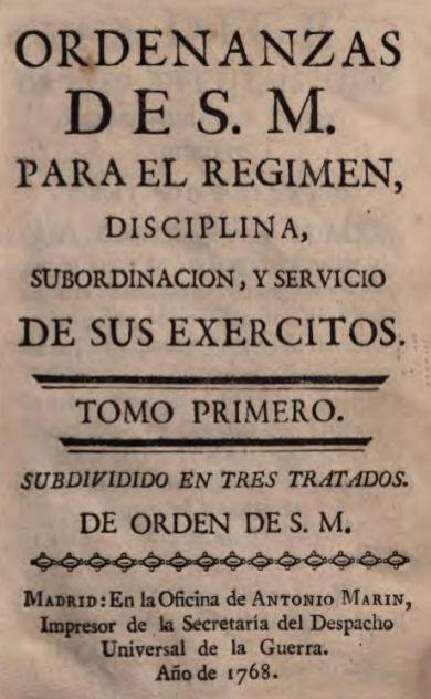 Portada del primer tomo del las reales ordenanzas de Carlos III publicadas en 1768 La imagen ha sido editada para borrar las anotaciones manuales en su parte de arriba